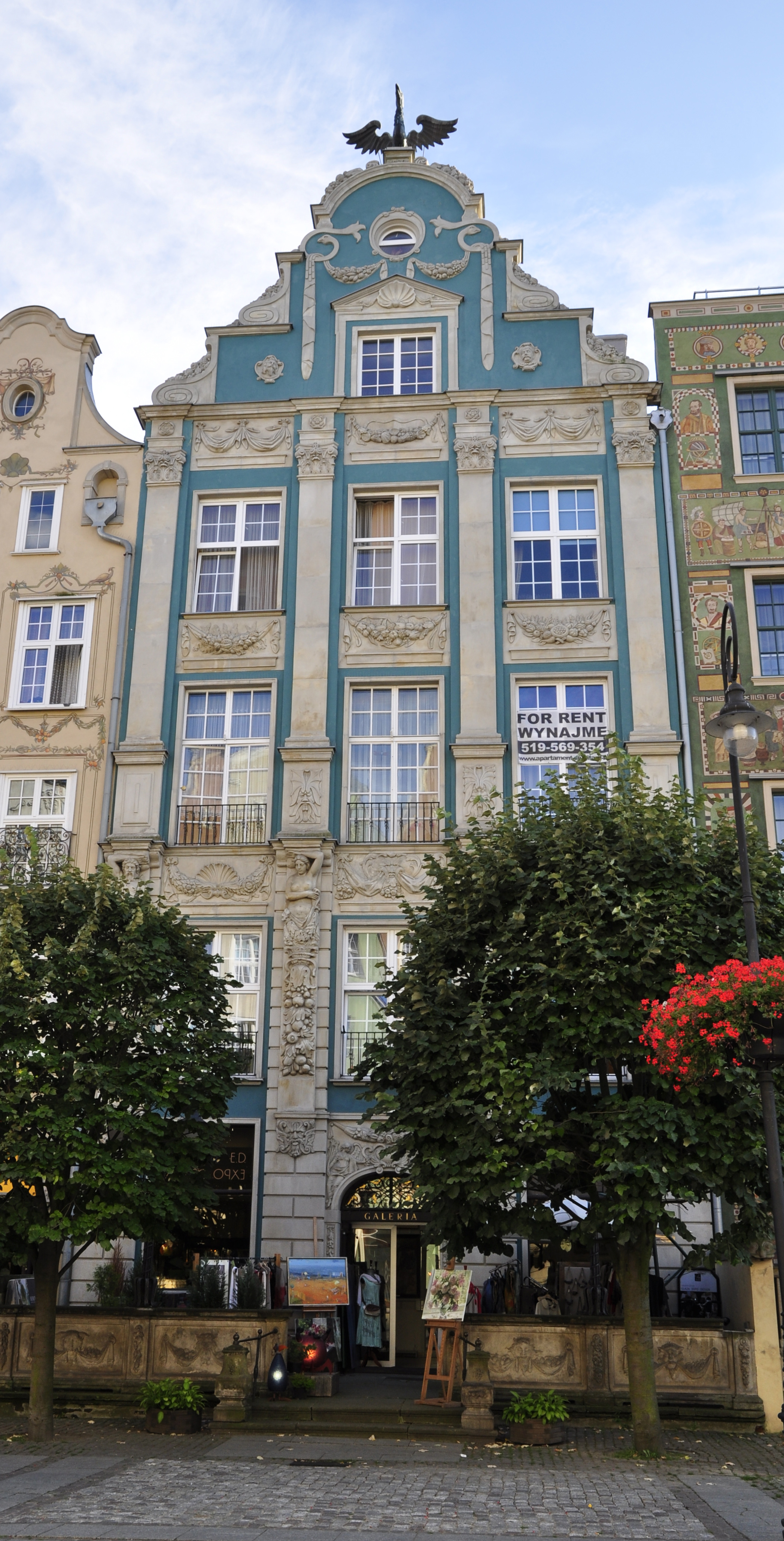 Kamienica Gdańsk, ul. Długi Targ 20